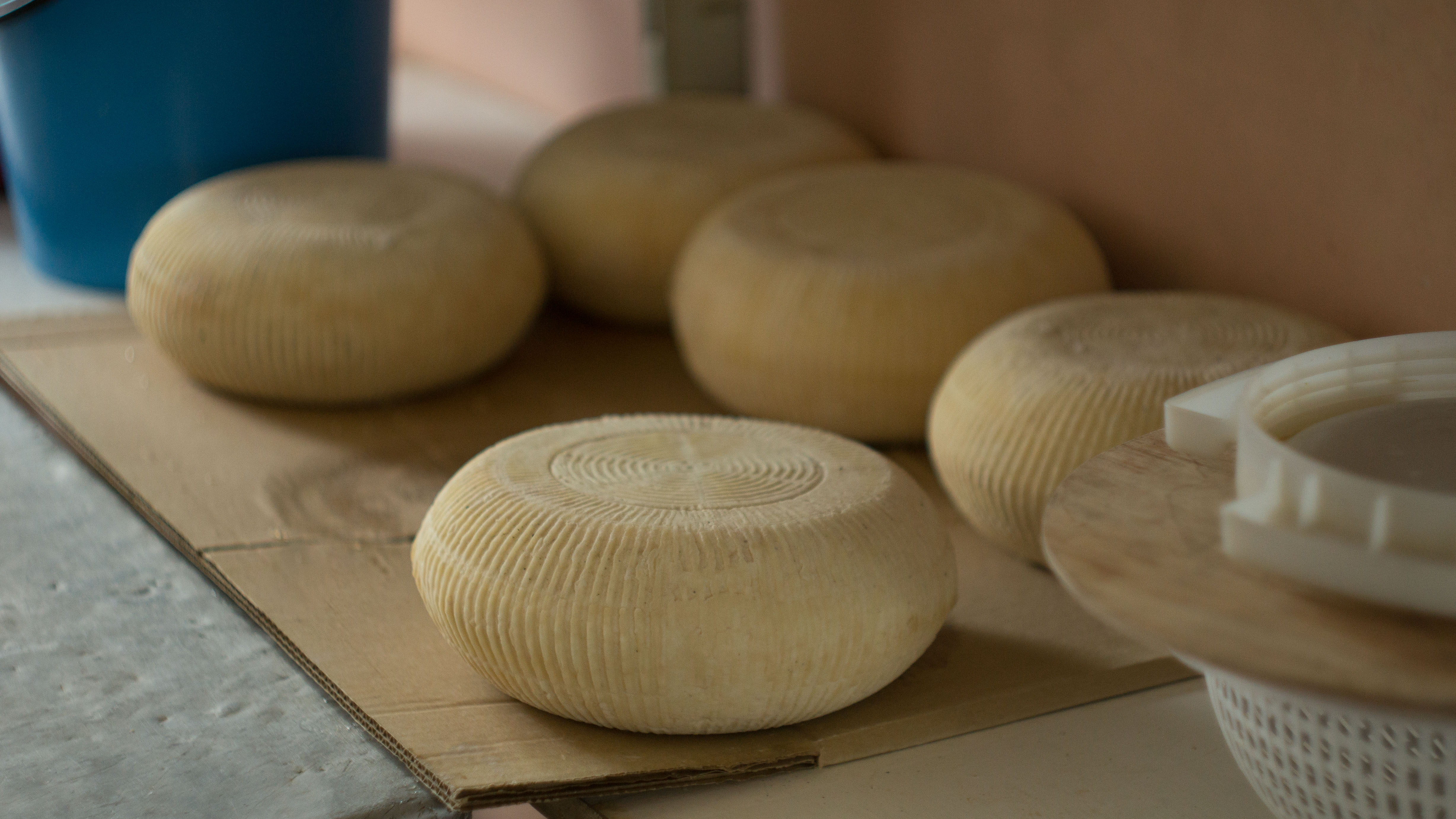 Осетинский сыр (твердый).